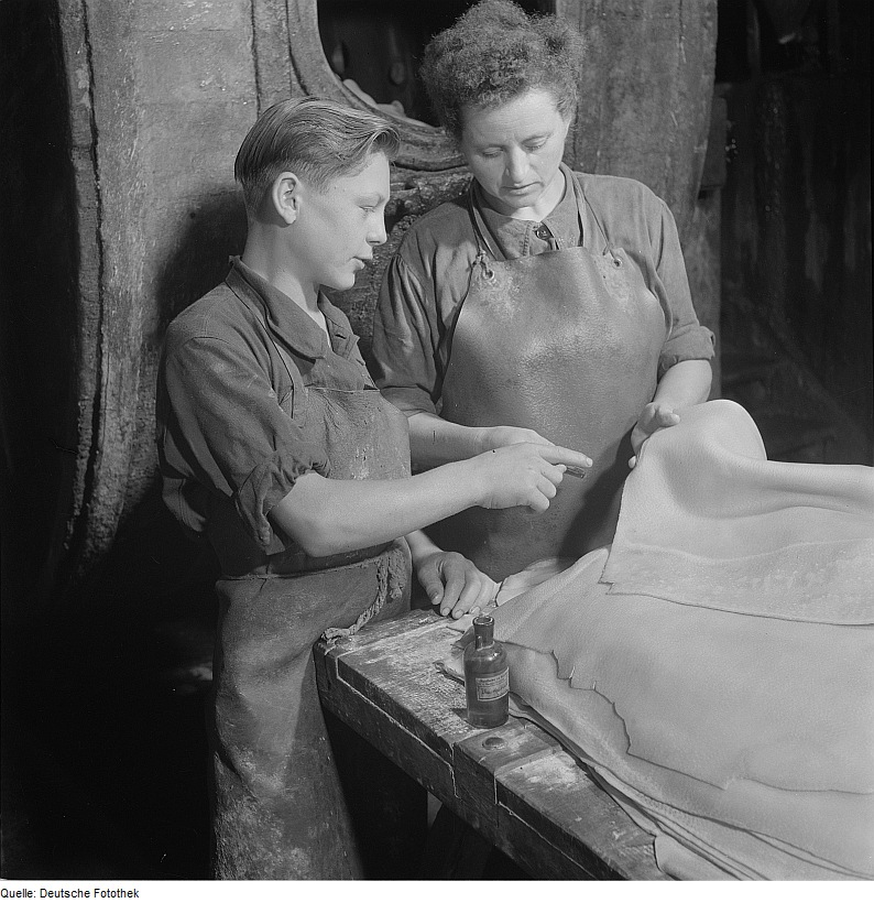 Original image description from the Deutsche Fotothek Lederwerk